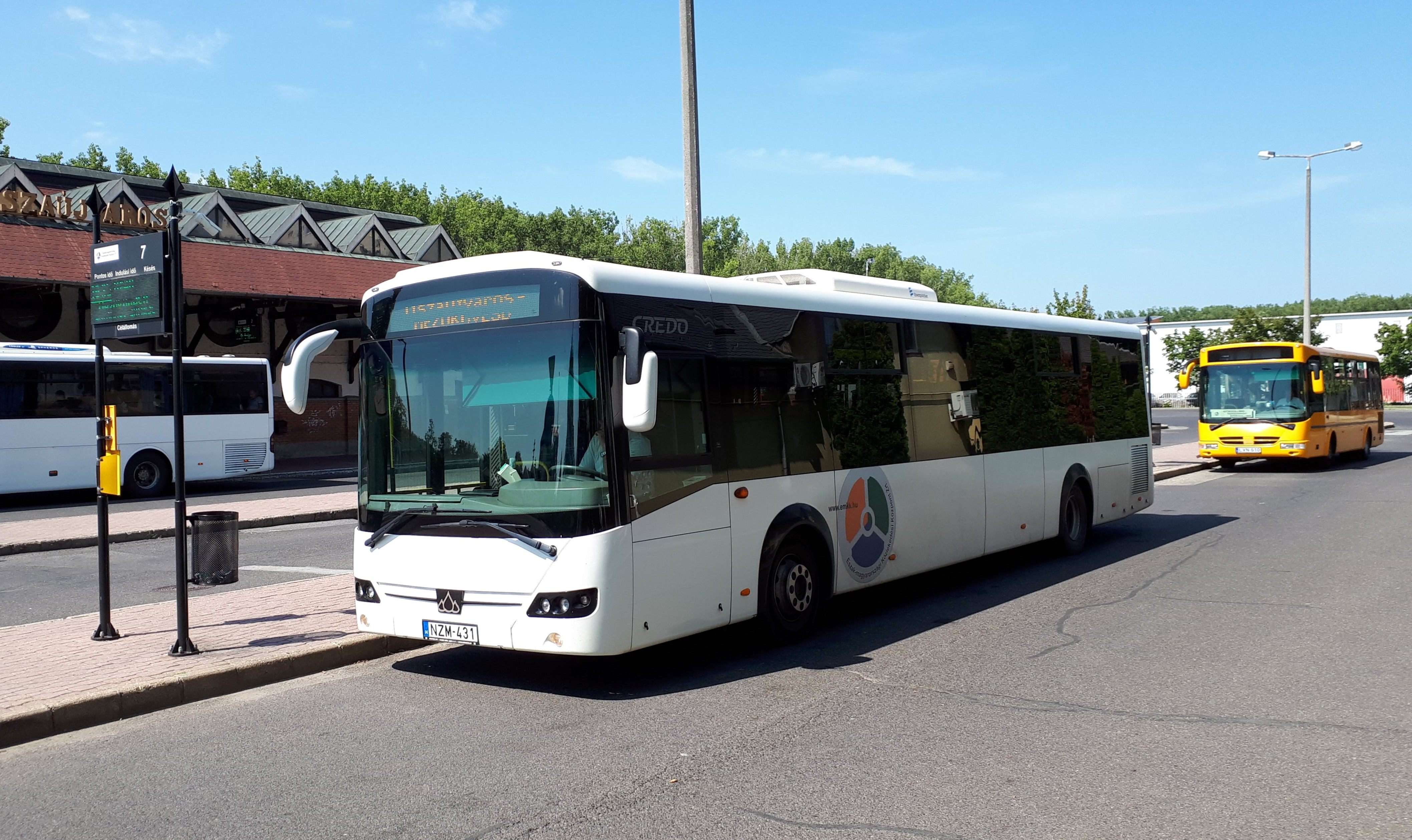 Az ÉMKK NZM-431 rendszámú Credo Econell 12 típusú busza Tiszaújvárosban, a 4008-as helyközi járaton.